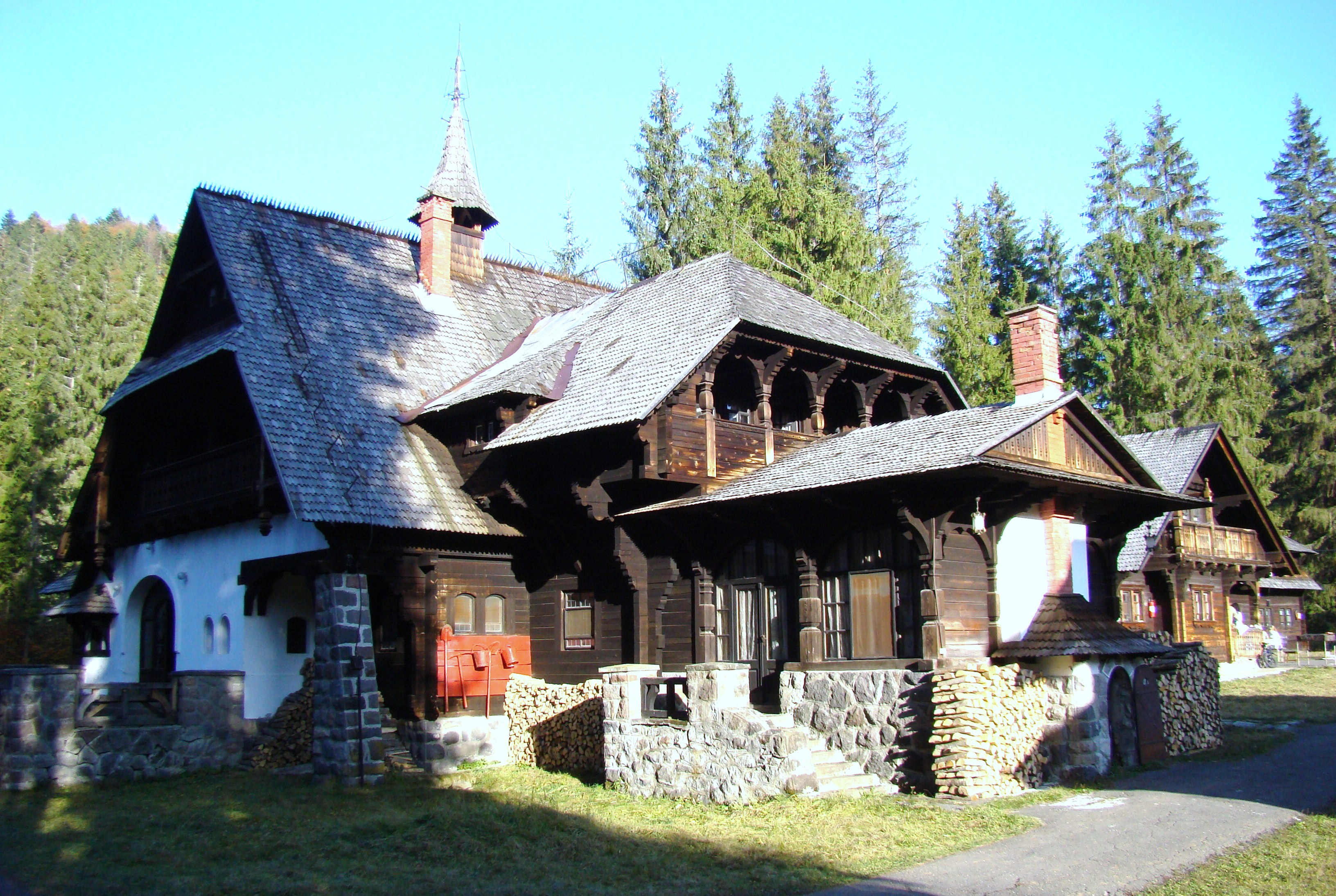 Ansamblul castelului de vânătoare Lăpuşna